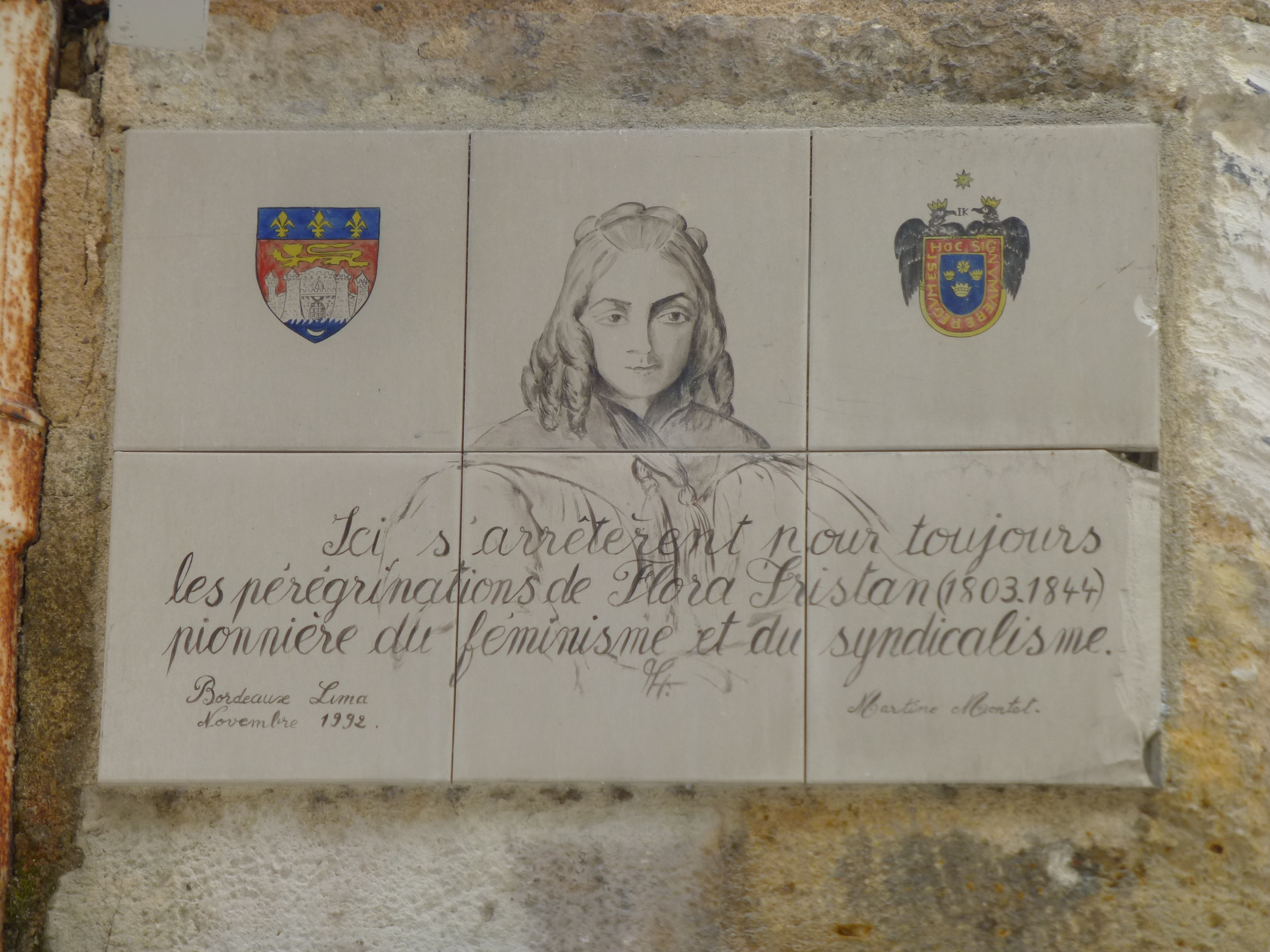 Plaque commémorative Flora Tristan, rue des Bahutiers à Bordeaux : Ici s'arrêtèrent pour toujours les pérégrinations de Flora Tristan (1803-1844) pionnière du féminisme et du syndicalisme.